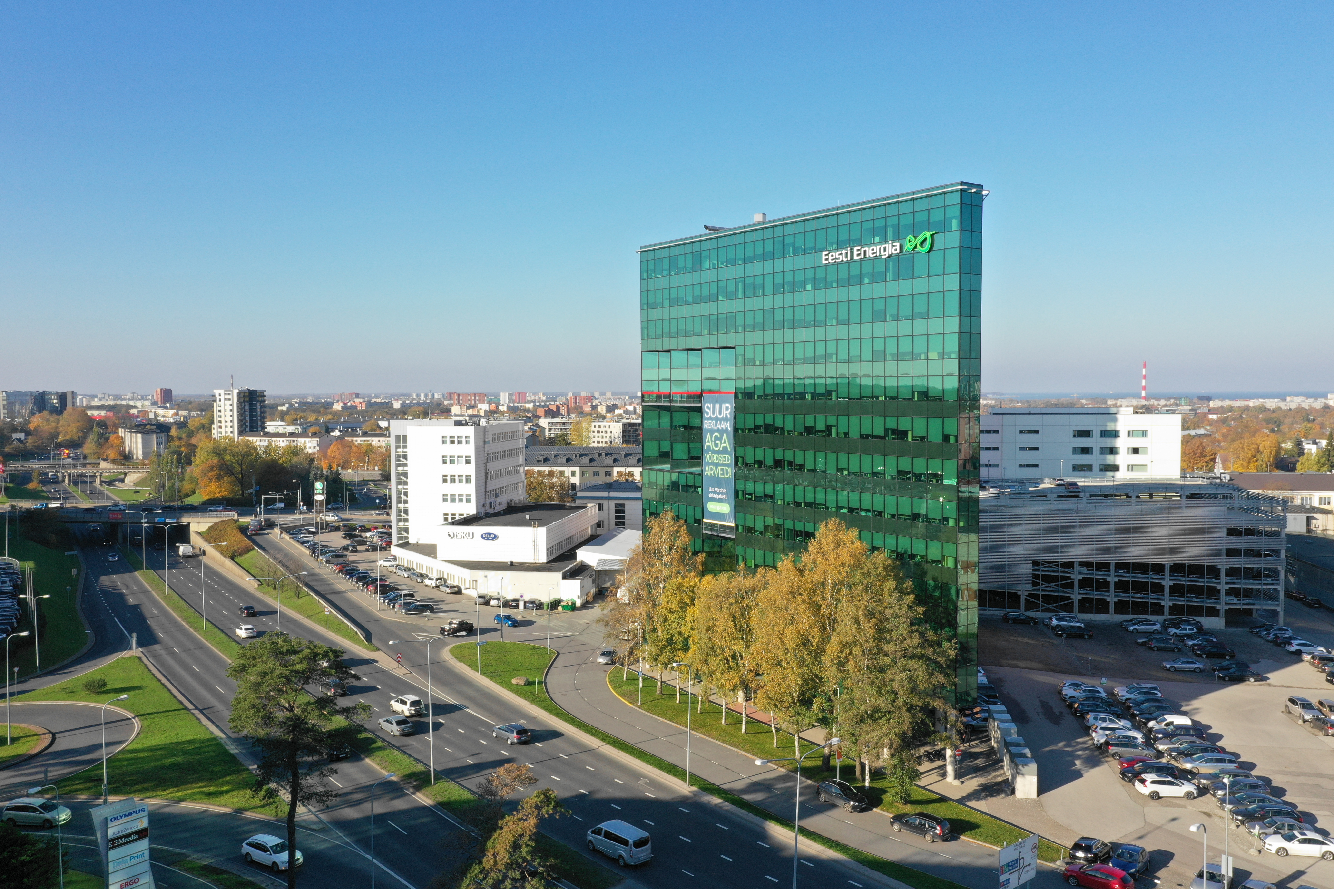 Fotol on Eesti Energia peahoone Tallinnas.